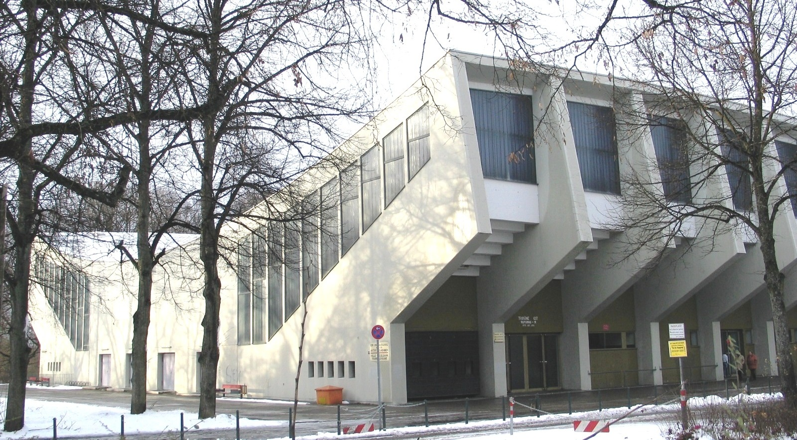 Sporthalle Augsburg, Außenansicht